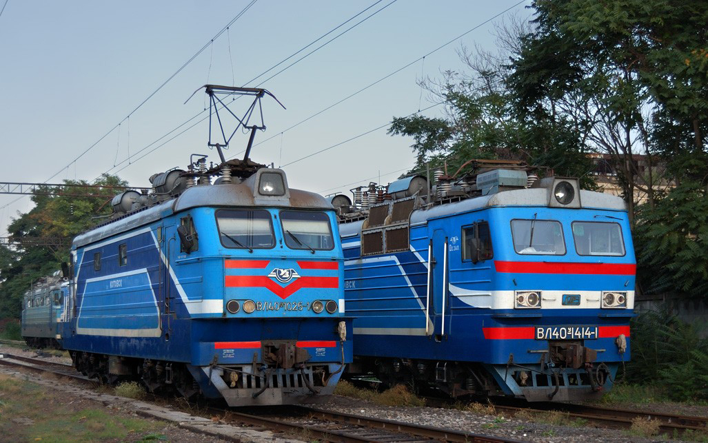 Электровозы ВЛ40У-1025.1 и ВЛ40У-1414-1 на ст. Одесса-Главная